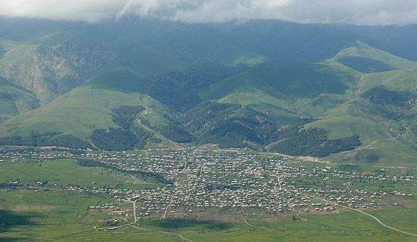 Գյուղի տեսքը Ամպասարից